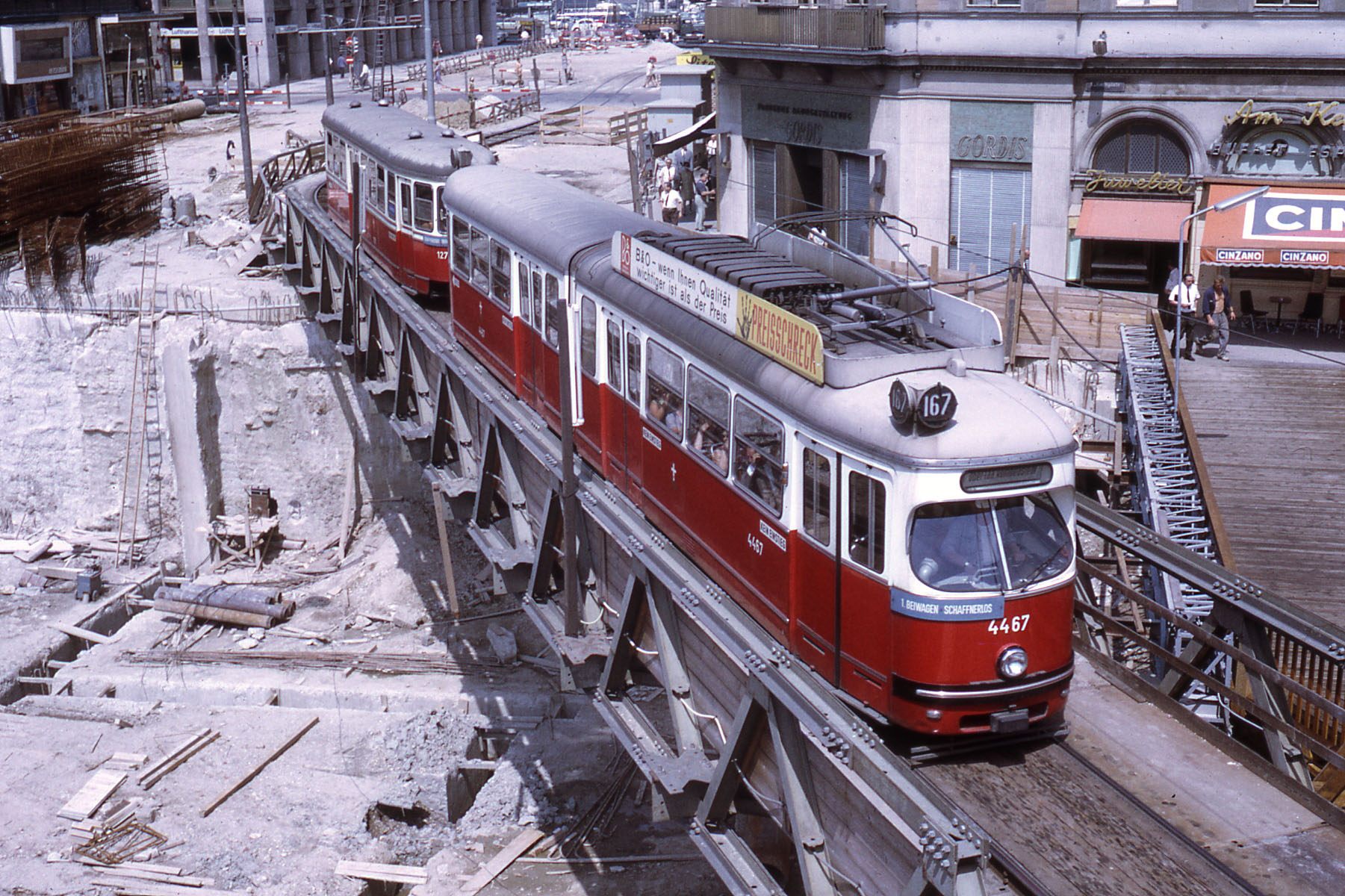 E1 4467 auf Linie 167 passiert am Karlsplatz eine Behelfsbrücke über die U-Bahn-Baustelle. Der Triebwagen wurde 2005 an die Straßenbahn Krakau verkauft.